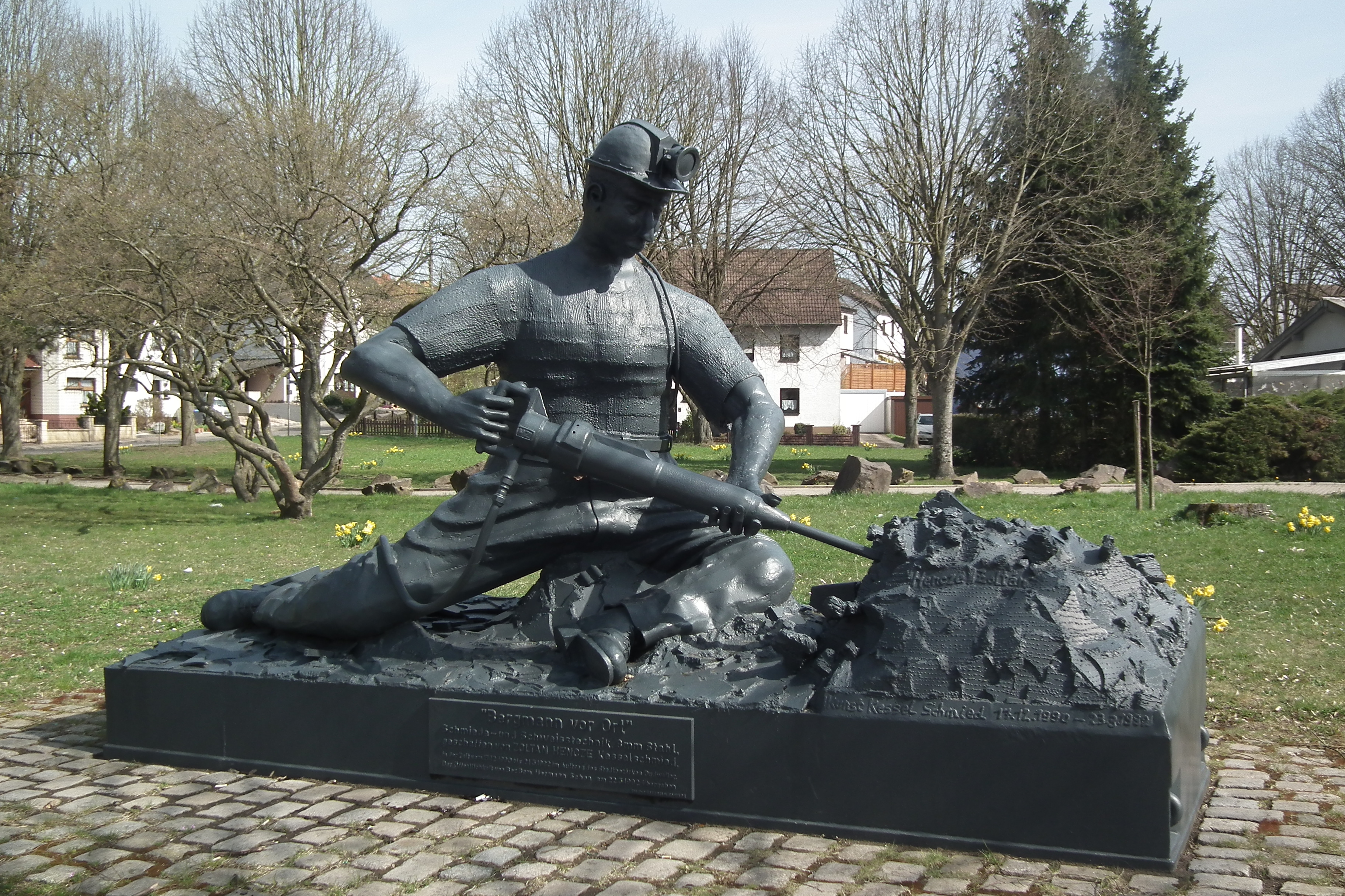 Stahlskulptur "Bergmann vor Ort" geschaffen von Zoltan Hencze im Jahre 1992